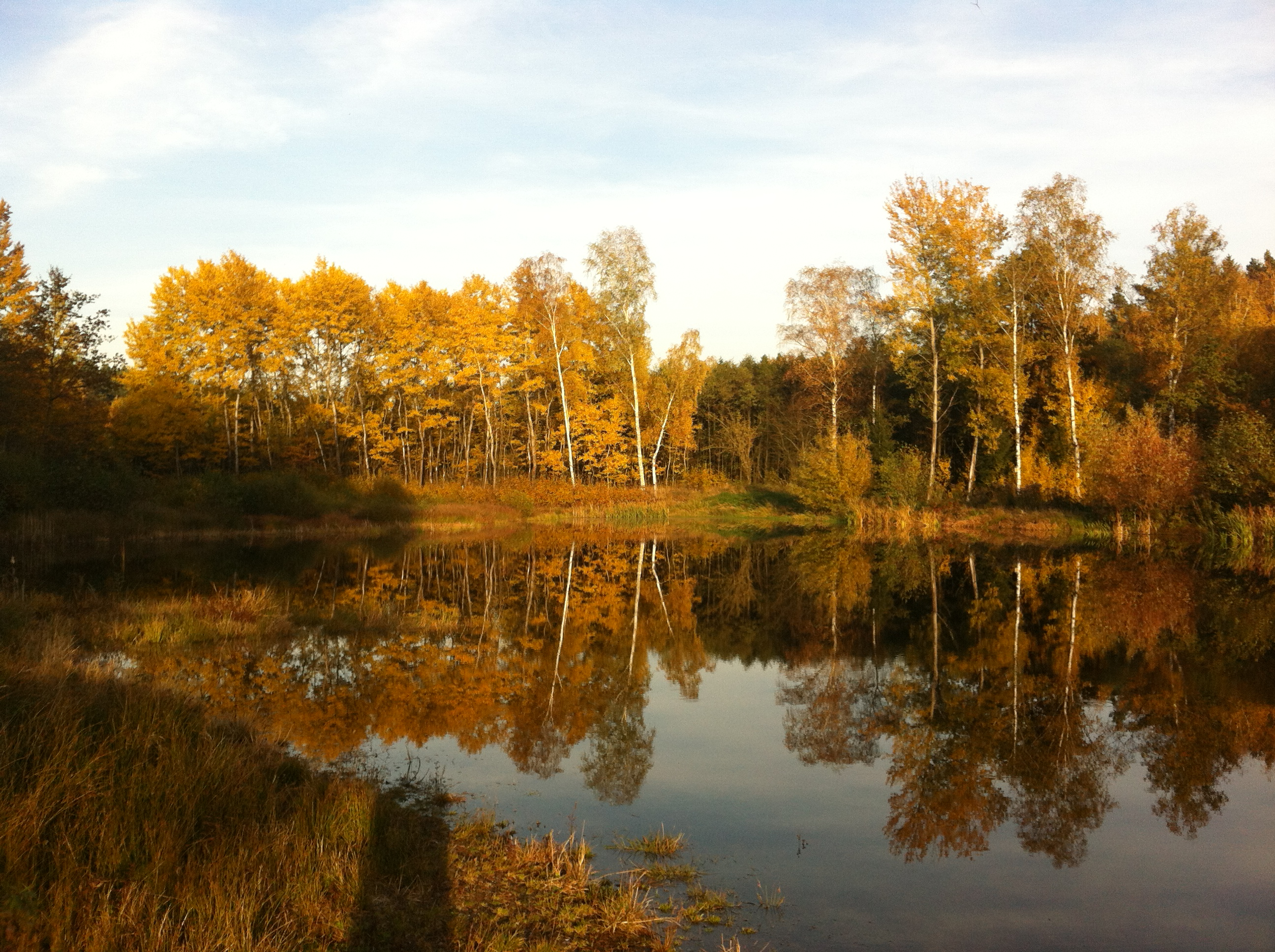 Hallteich Rottmar im Winter